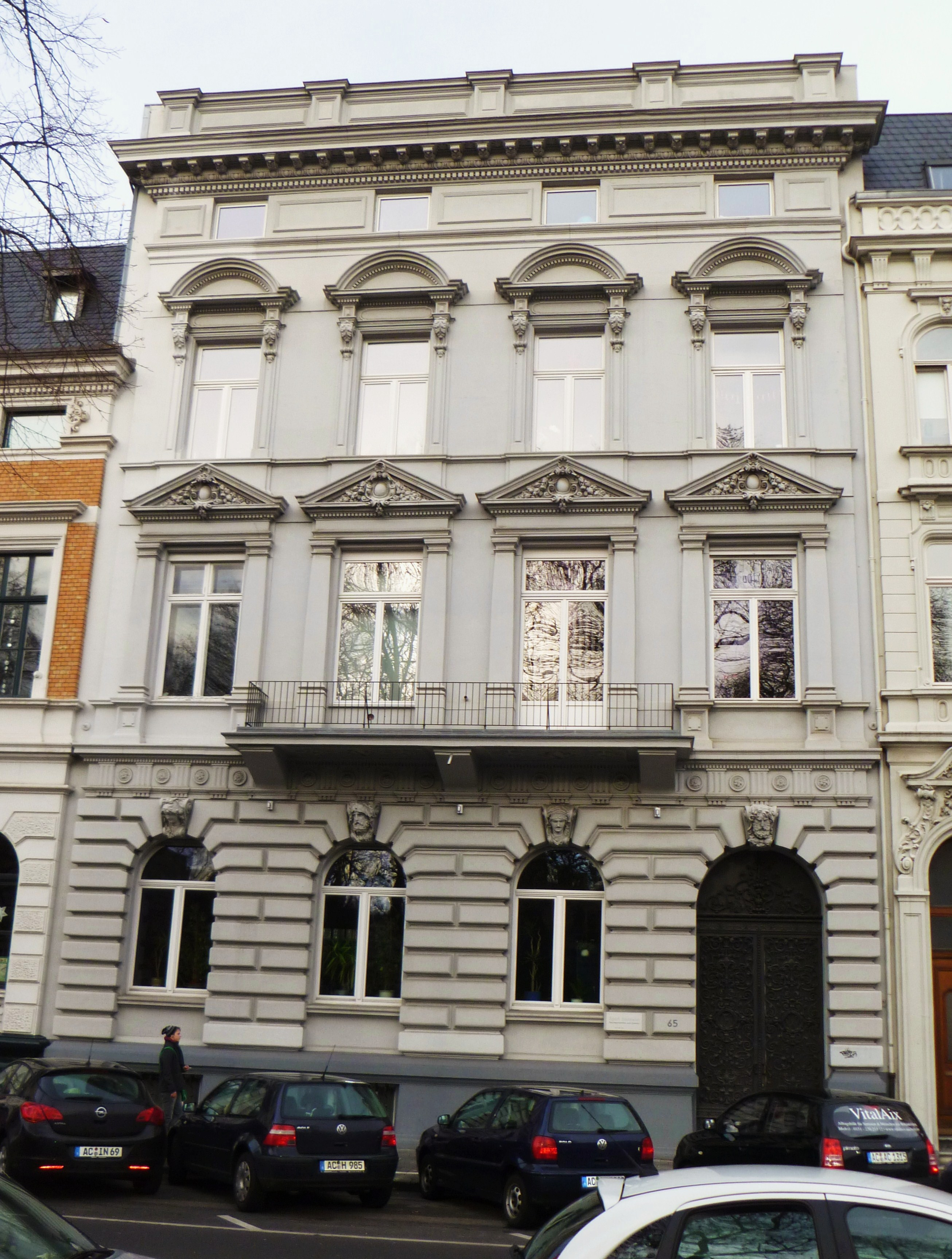 Baudenkmal in Aachen-Frankenberg